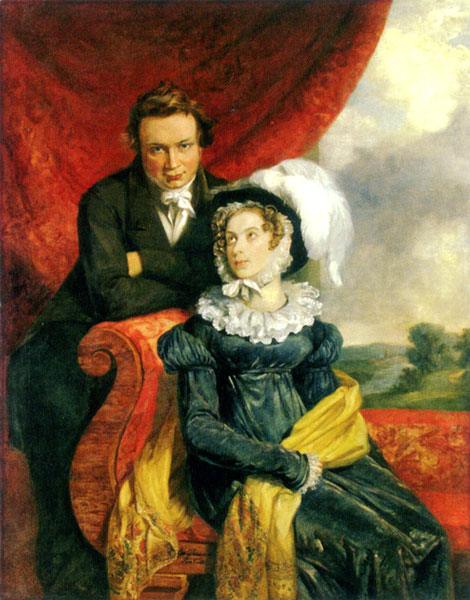 Поэт Павел Александрович Межаков (1788-1865) с женой Ольгой Ивановной Межаковой, ур.Брянчаниновой (1794-1833).